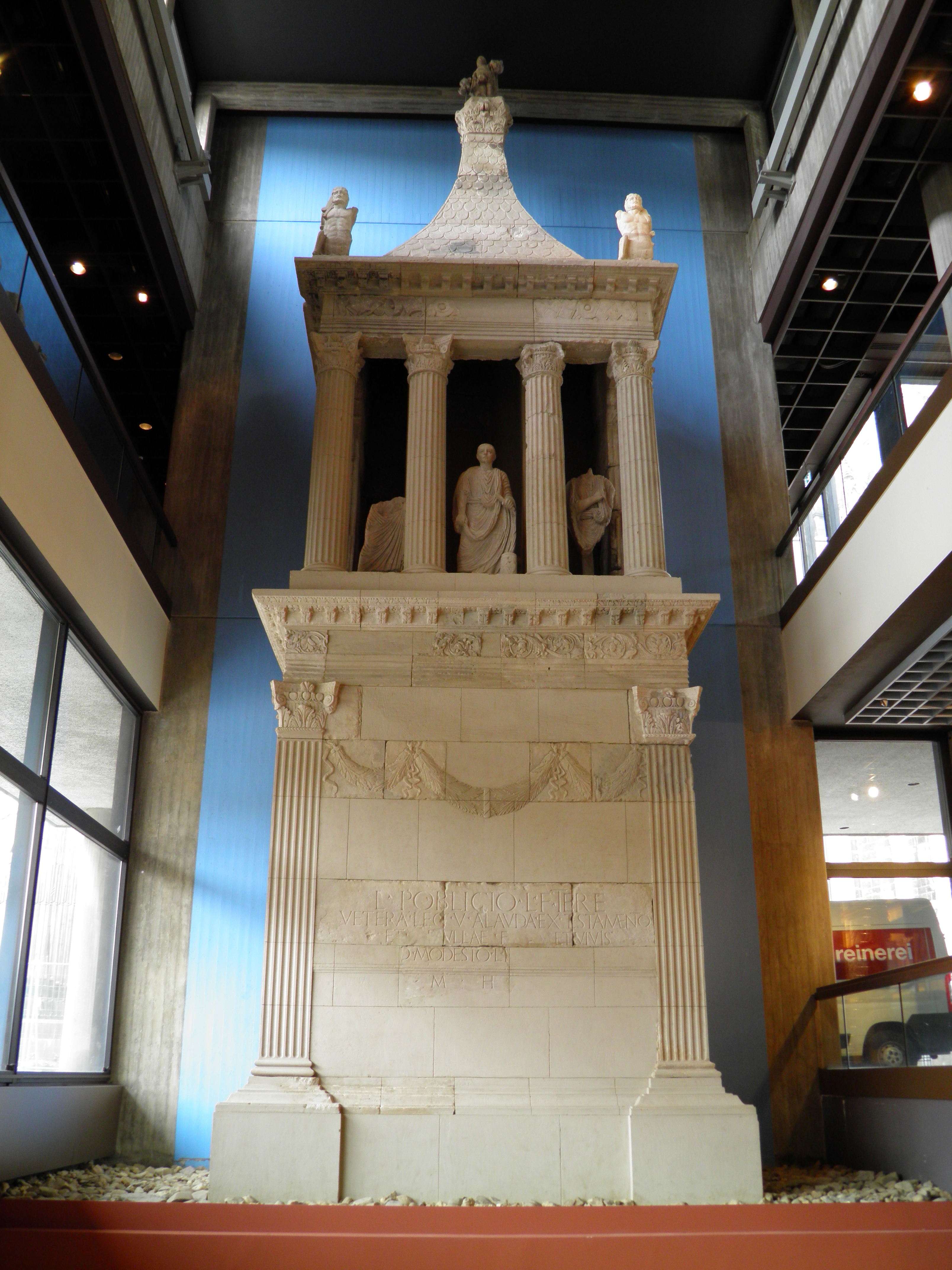 Romisch-Germanisches Museum, Cologne